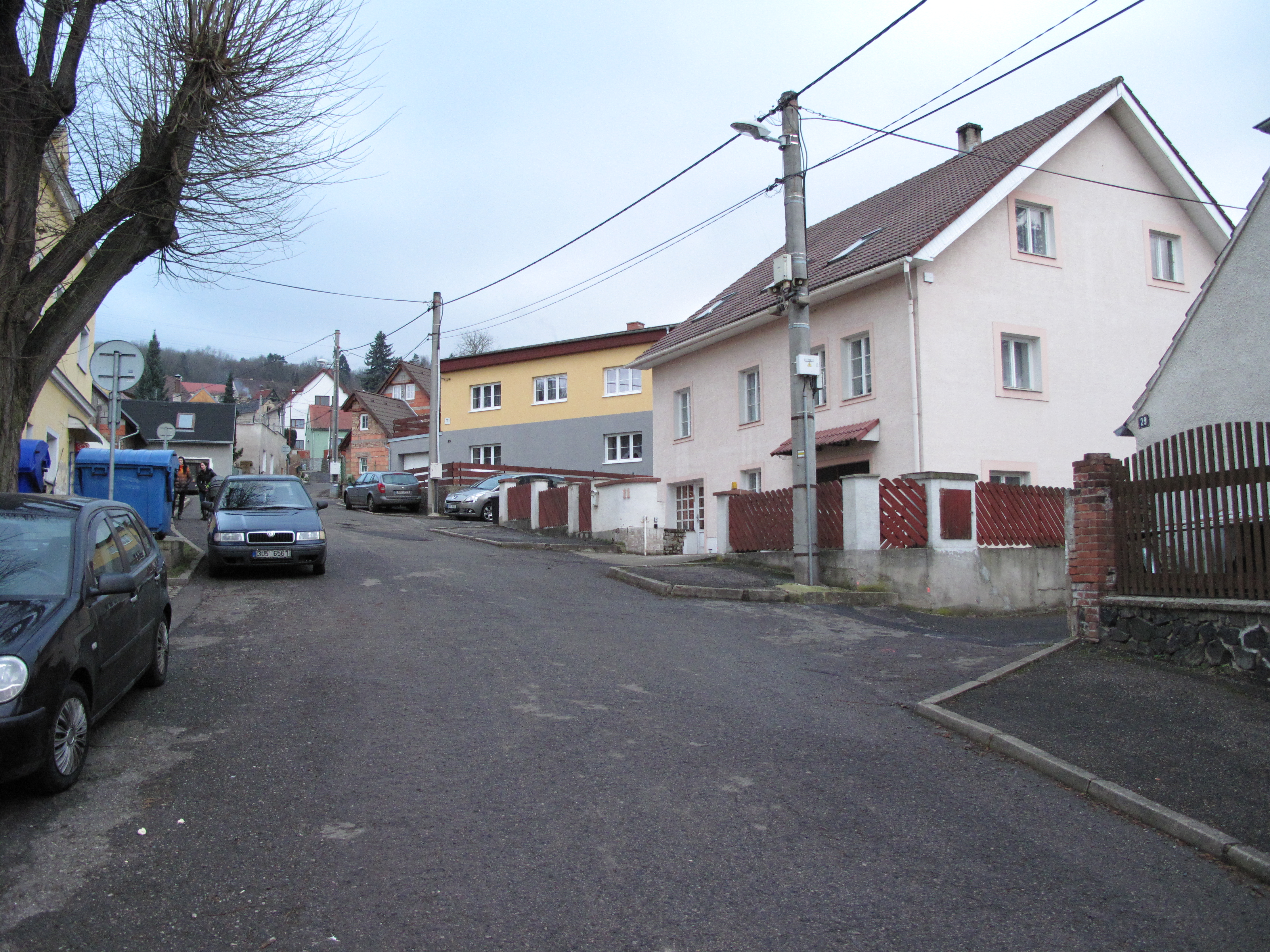 Ulice v Ohníči. Okres Teplice, Česká republika.